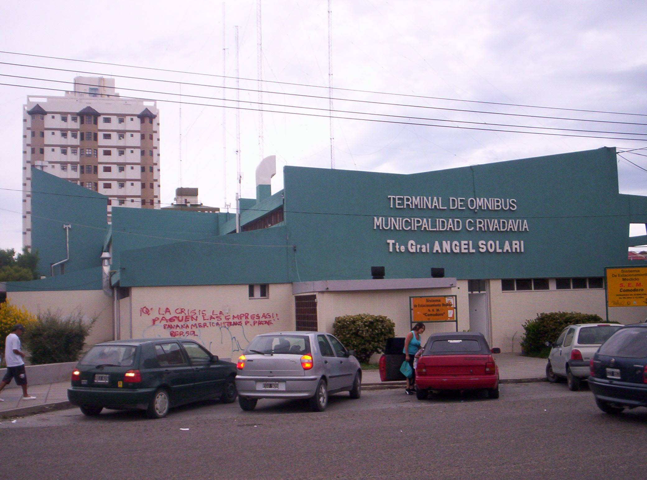 la terminal de omnibus de la ciudad de Comodoro Rivadavia, haciendo mención y honor al ex Gobernador Militar de Comodoro Rivadavia General Angel Solari, tío abuelo de Mariana, Javier y el famoso Daniel Alberto Solari